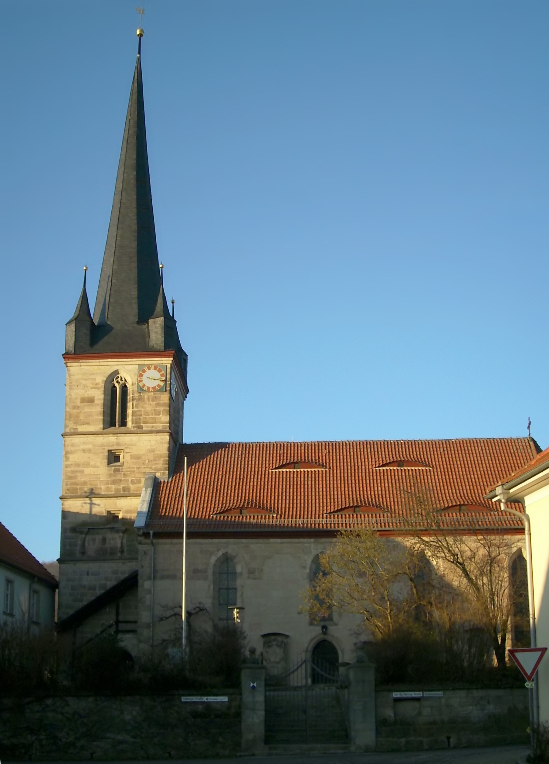 Ansicht: Ortseinfahrt - Kirche in Schmölz (Küps)